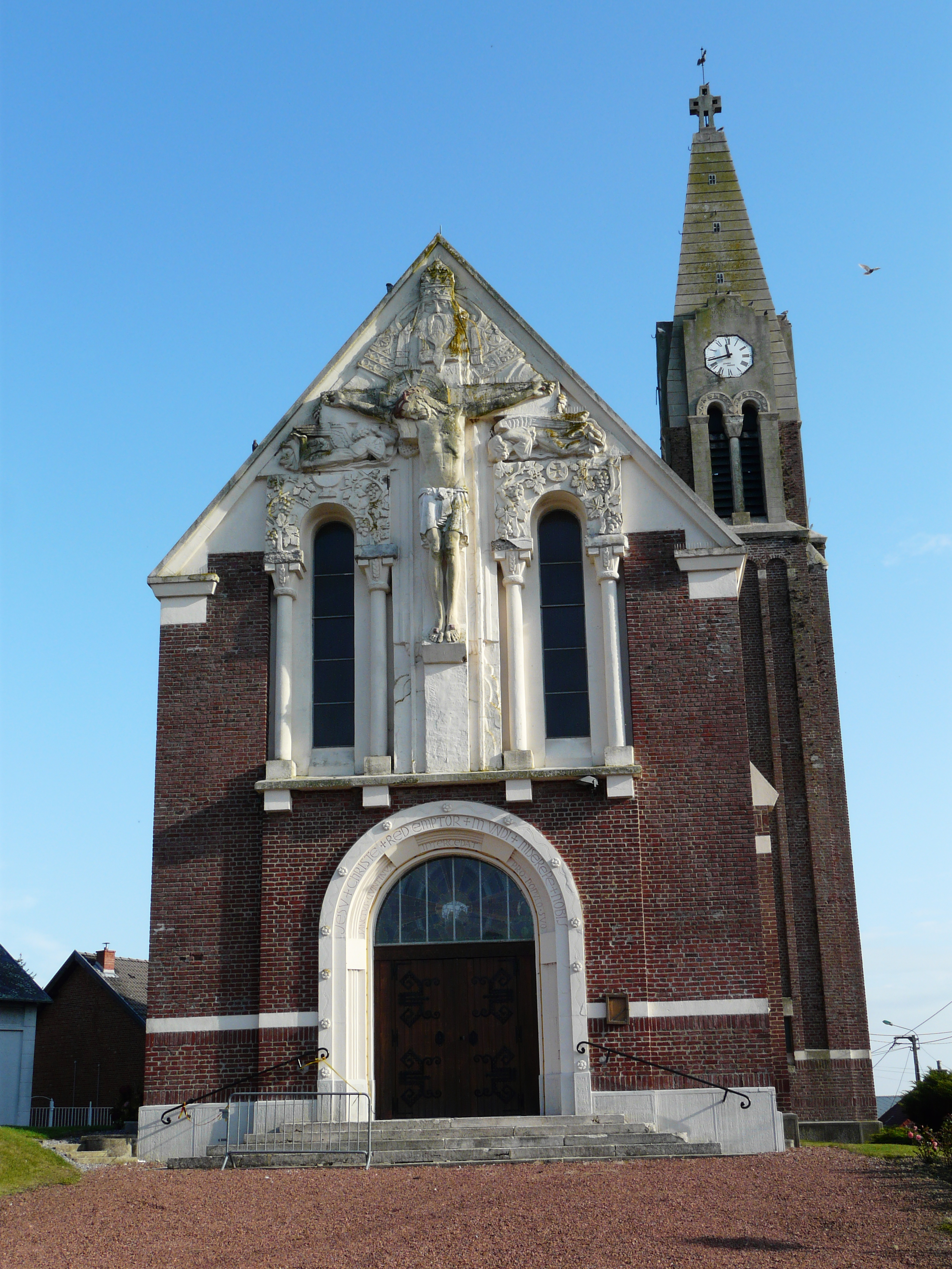 L'église de Villers-Plouich (Nord), construite en 1930 sur les plans de Pierre Leprince-Ringuet (façade)